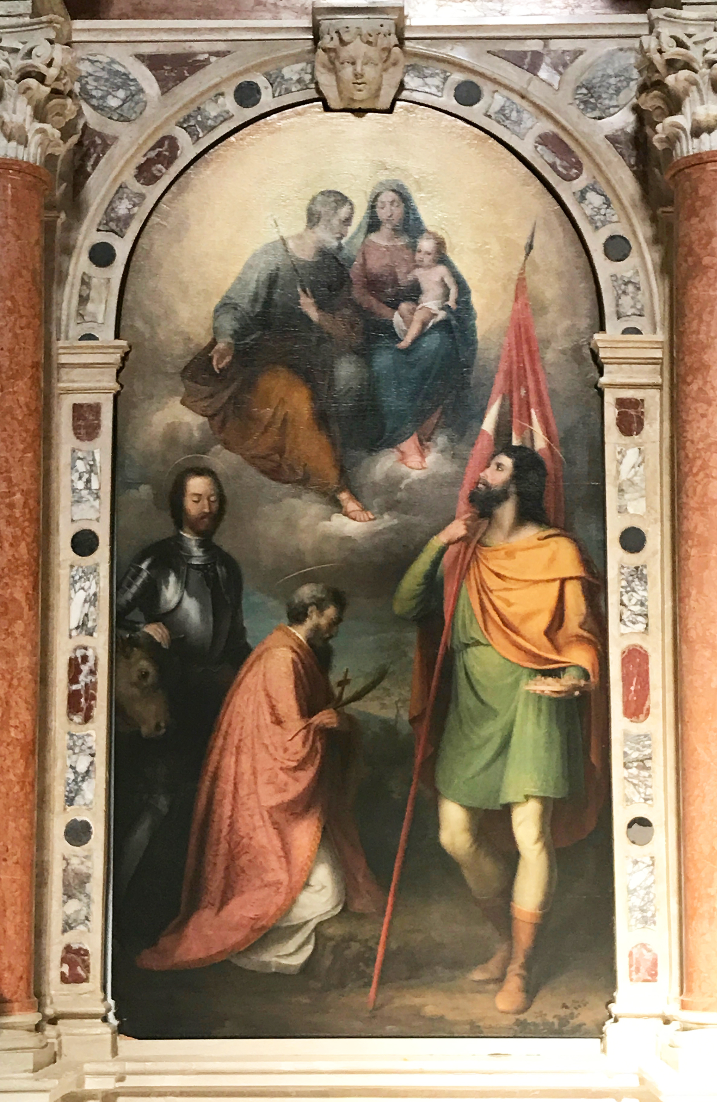 Pala d'altare "Sacra Famiglia, San Liberale, San Valentino e San Bovo" di Giovan Battista Carrer, 1837 (ph 2017)